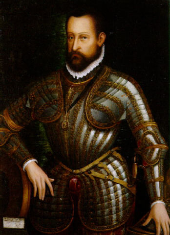 Alfonso d'Este